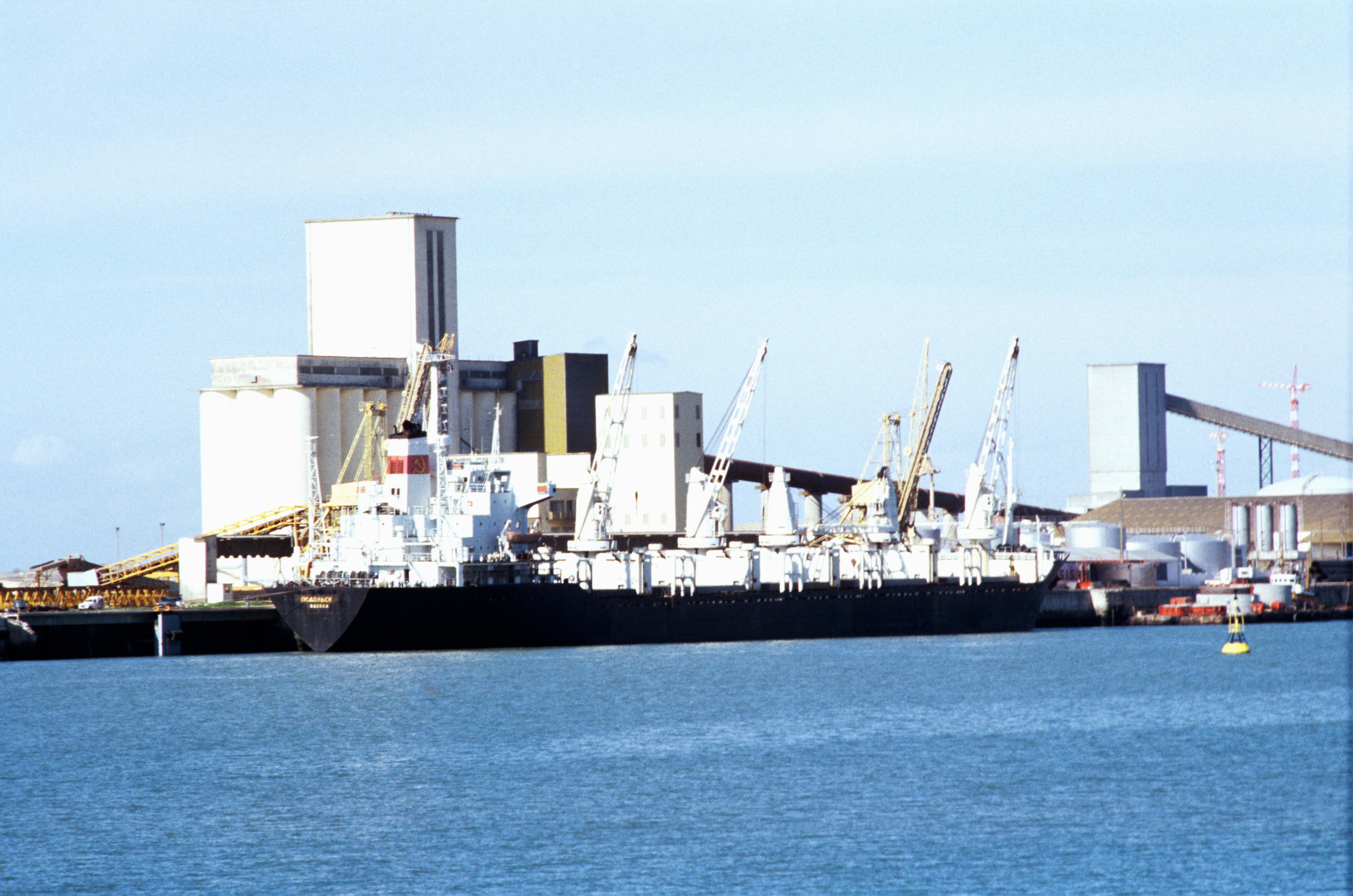 Le navire cargo soviétique Подольск (Podolsk) d' Odessa amarré au quai céréalier du port de la Pallice. Ce navire est un vraquier construit en 1981, IMO number: 7932599. Dominant le navire, à l' arrière plan, le silo Lombard construit en 1959-1960. Port de commerce de La Rochelle-Pallice, La Rochelle, Charente Maritime, France.